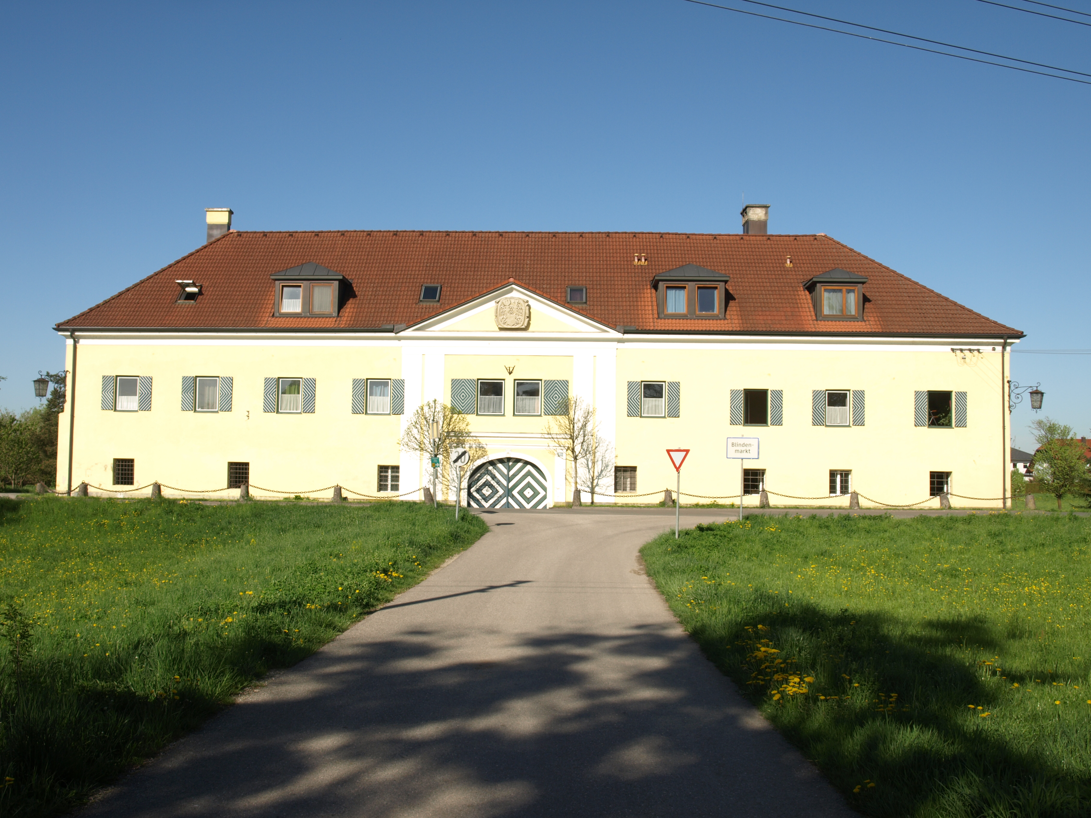 Schloss Auhof, ehem. Meierhof